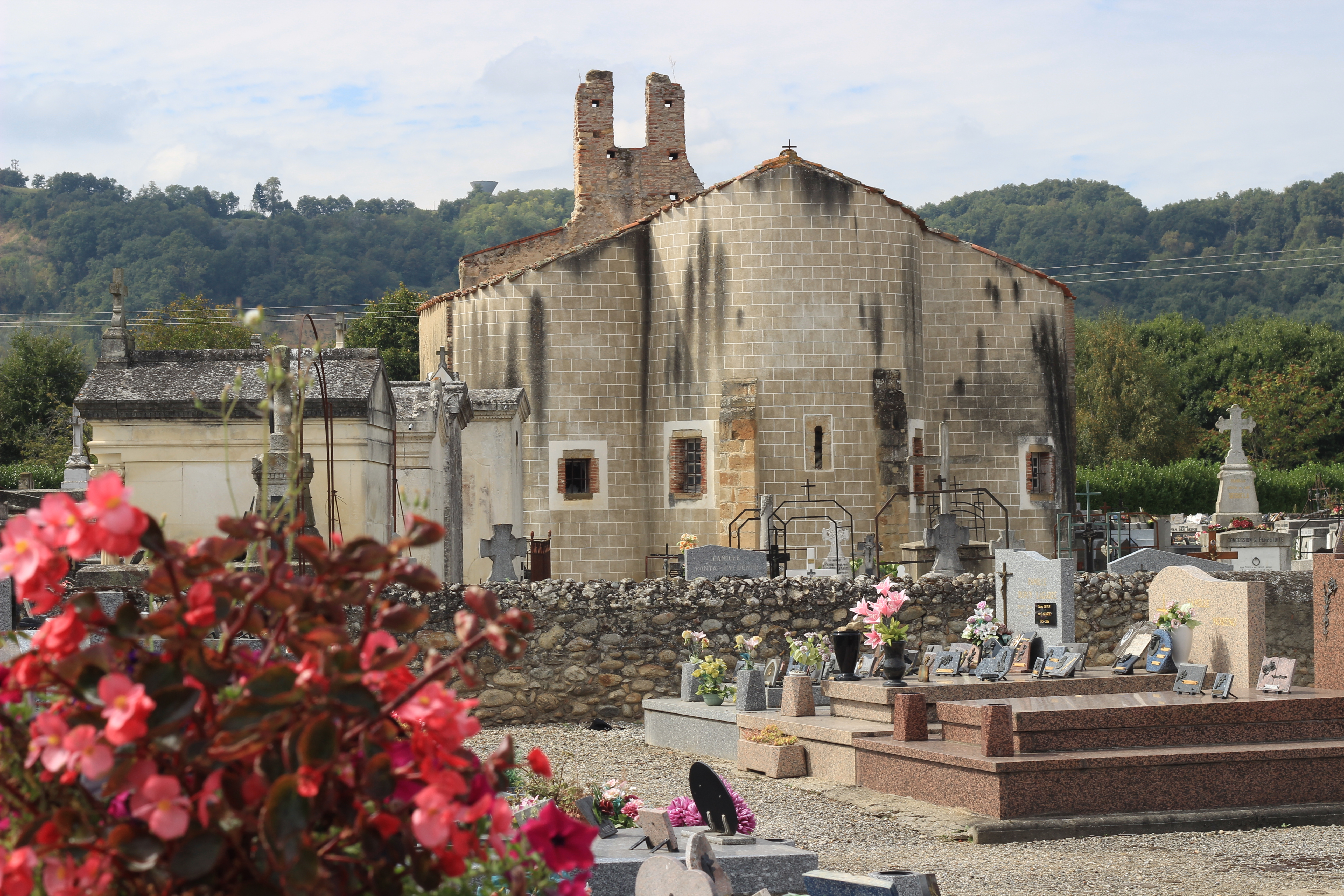 Chapelle du cimetière de Saint-Jean-du-Falga